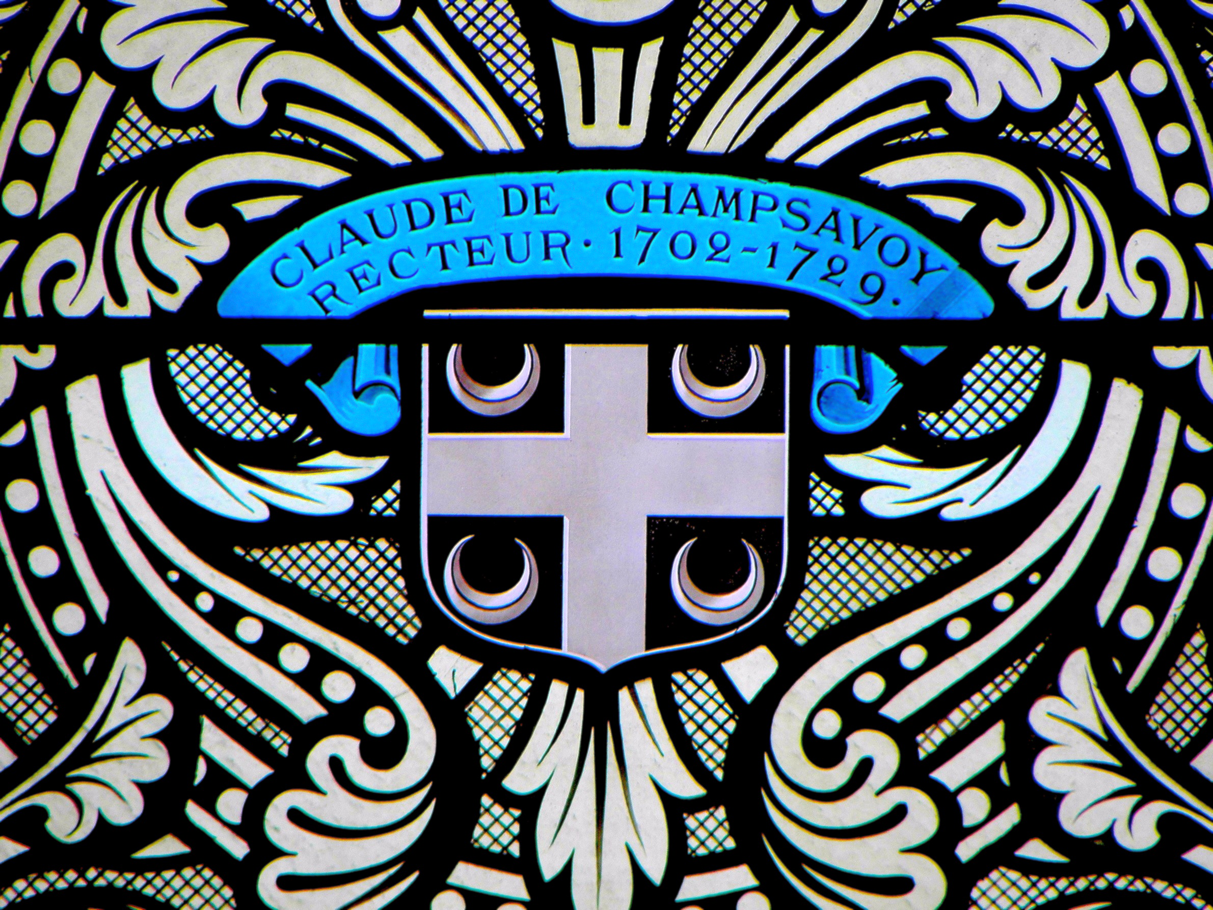 Vitrail de l'église Saint-Pierre-et-Saint-Paul d'Étrelles (35).